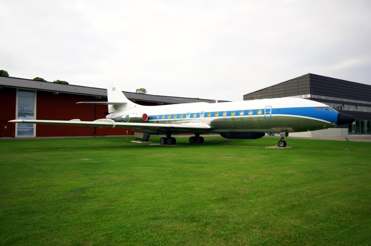 Sud Aviation SE-210 Caravelle III, Tp 85. Signalspaningsflygplan med en besättning bestående av två flygförare, en färdmekaniker och en navigatör. Motorer: Två Rolls Royce Avon RA29/3. Flygplanet tillverkades i Frankrike och beställdes av SAS som första utländska bolag. Det sattes i trafik i Sverige som SE-DAG 1959 och blev det första jetdrivna passagerarplanet i Norden. Flygplanet ansågs stabilt, komfortabelt, tyst och lättfluget. 1971 sålde SAS flygplanet till Flygvapnet och efter ombyggnad togs det i aktiv tjänst 1972 och försågs med typbeteckningen Tp 85 (85172). Under hela 26 år gjorde det sedan signalspaningsflygningar och då främst över Östersjön. Flygplanet kom i huvudsak att tjänstgöra på Malmen hos Försvarets radioanstalt (FRA). Sista flygningen skedde den 30 september 1998. Flygplanet överfördes därefter till Flygvapenmuseum, men stod fortfarande kvar på Malmen. Först den 17 februari 2012 fick flygplanet sin slutliga placering utanför museet.